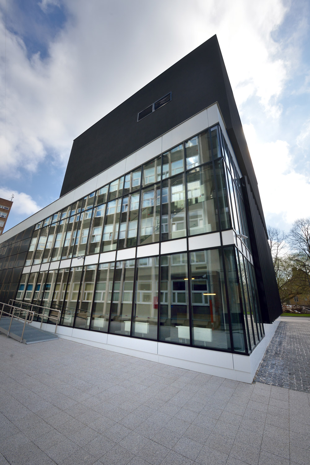 Wizualizacja laboratorium